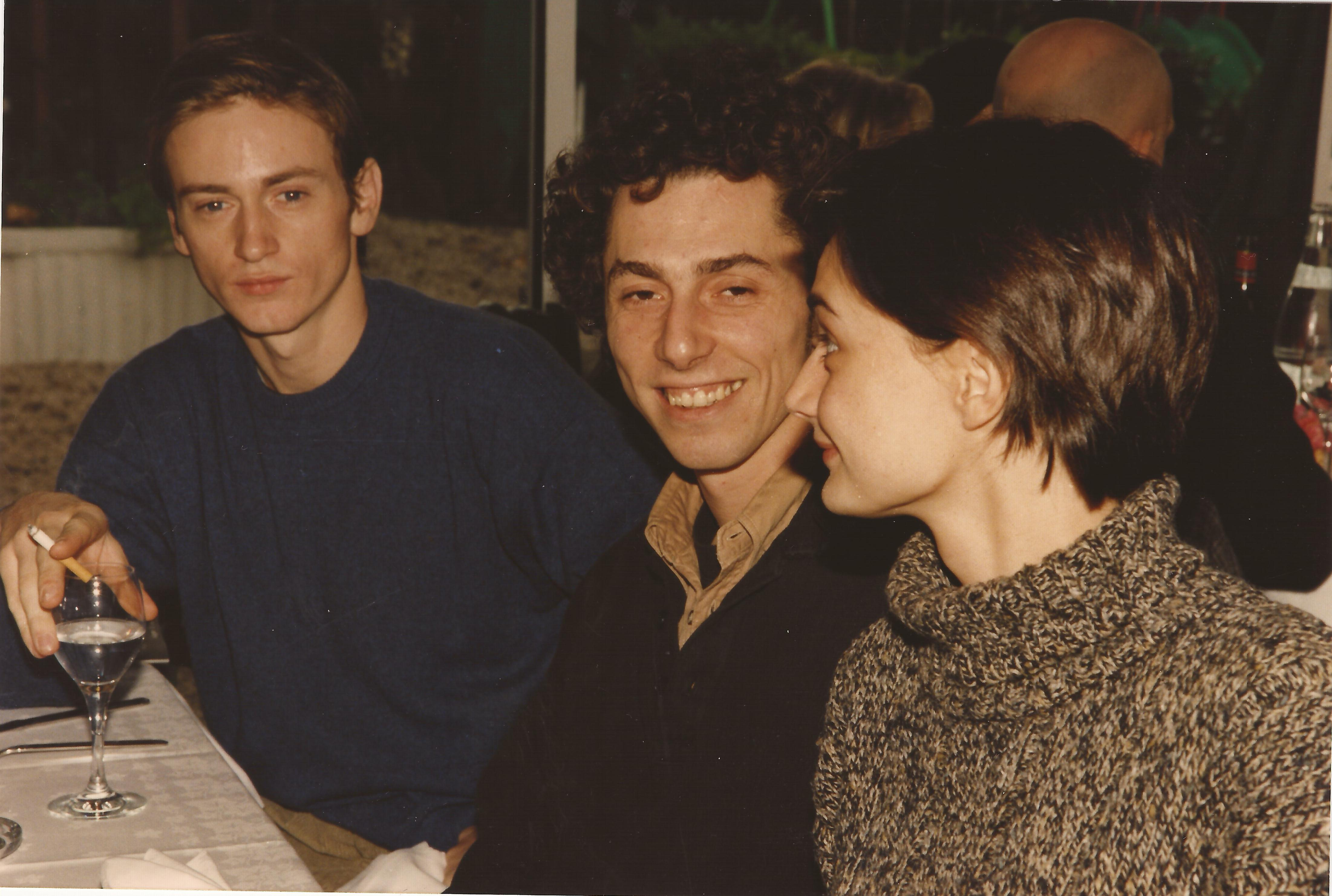 Simon Lelouch au Festival des Passions d'Aubagne avec Benoit Magimel